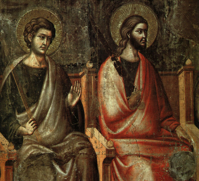 Detalle del cuadro "El juicio Final"